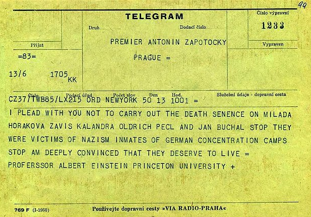 Einstein apeloval tímto telegramem ve věci hrdelních trestů vůči Horákové a ostatním i na Zápotockého.